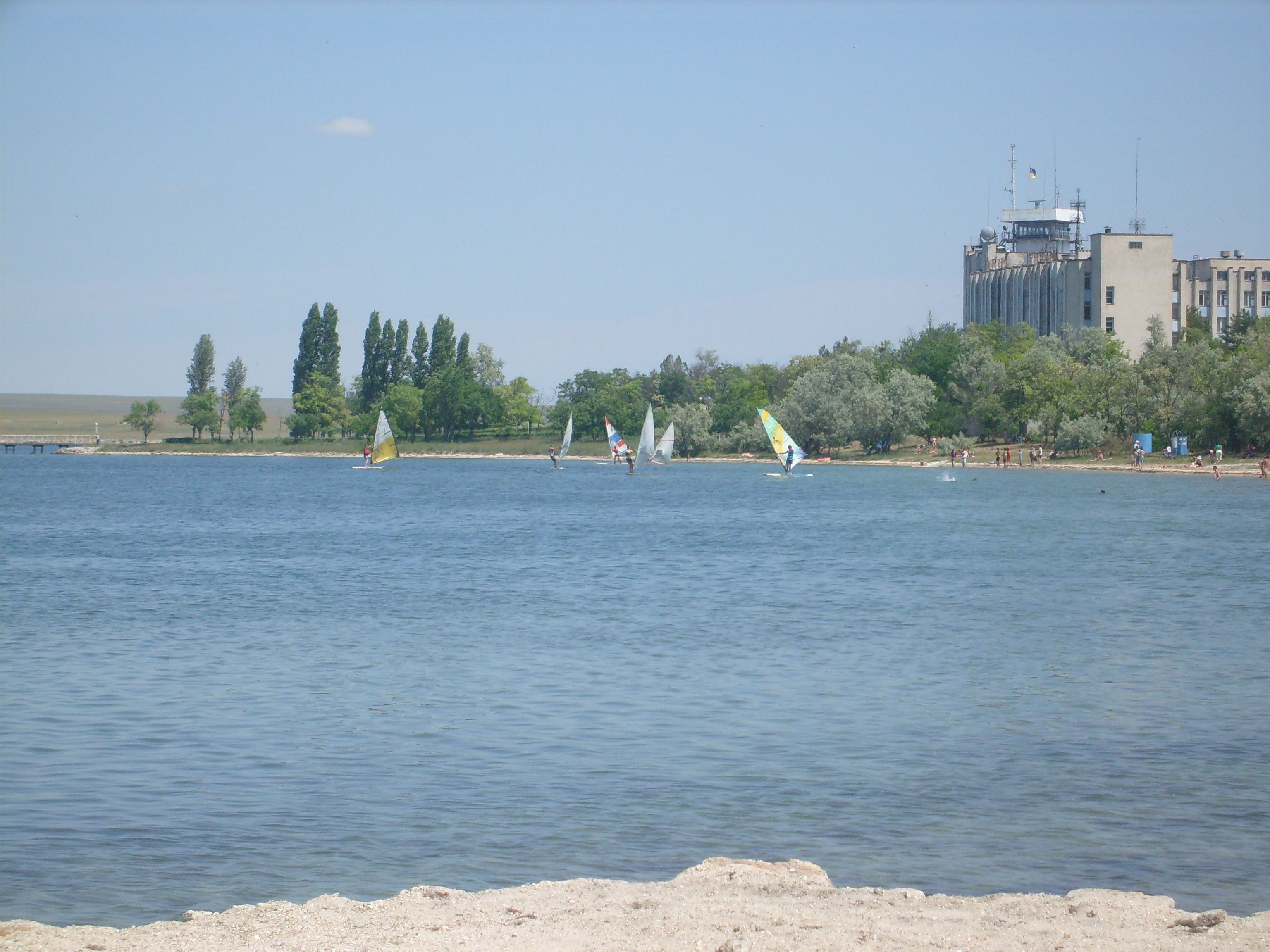 Новоозёрное